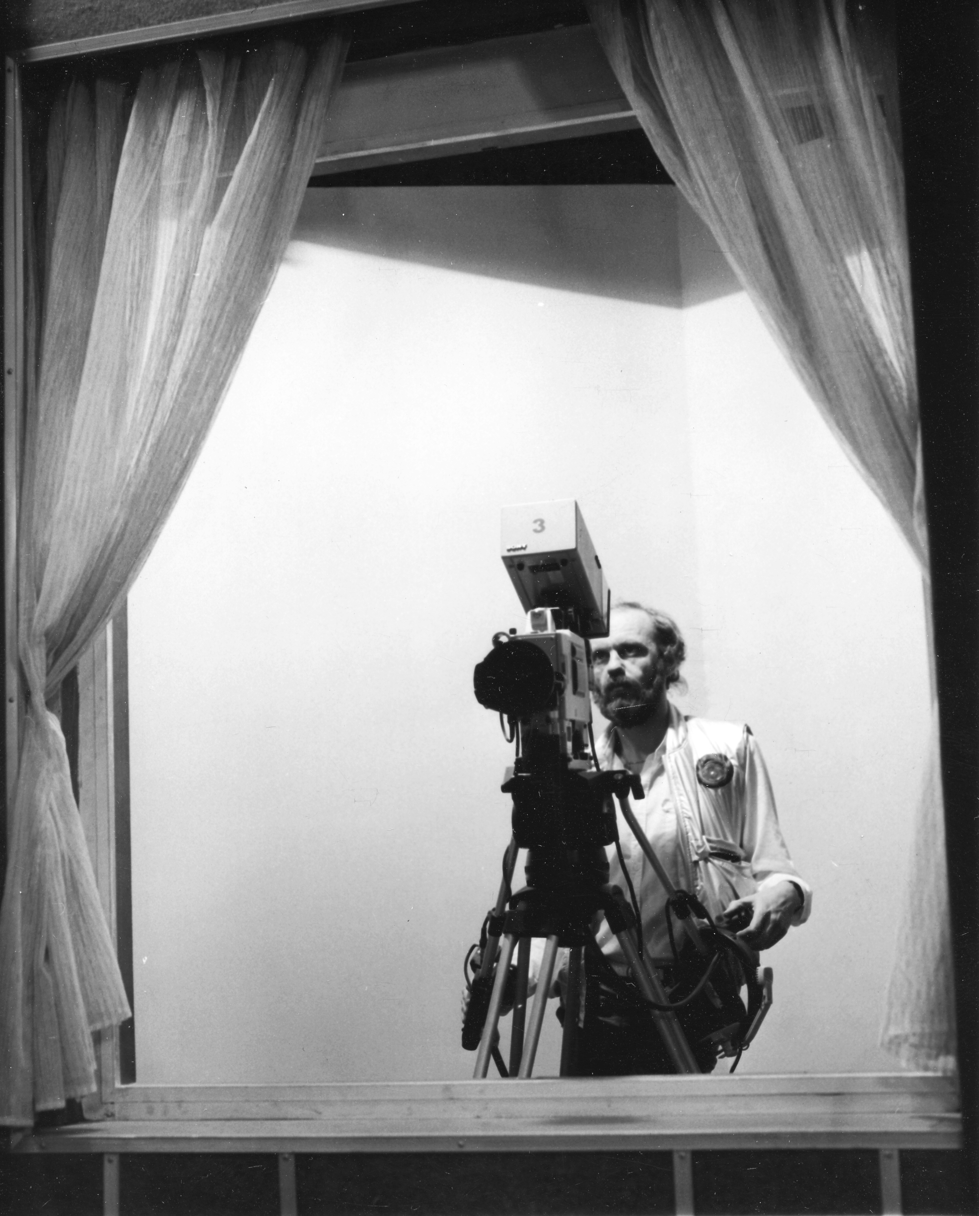 az MTV Ablak című műsorának stúdiója, Kalmár András operatőr. Location: Hungary, Budapest V. Tags: Hungarian TV, Budapest Title: az MTV Ablak című műsorának stúdiója, Kalmár András operatőr.